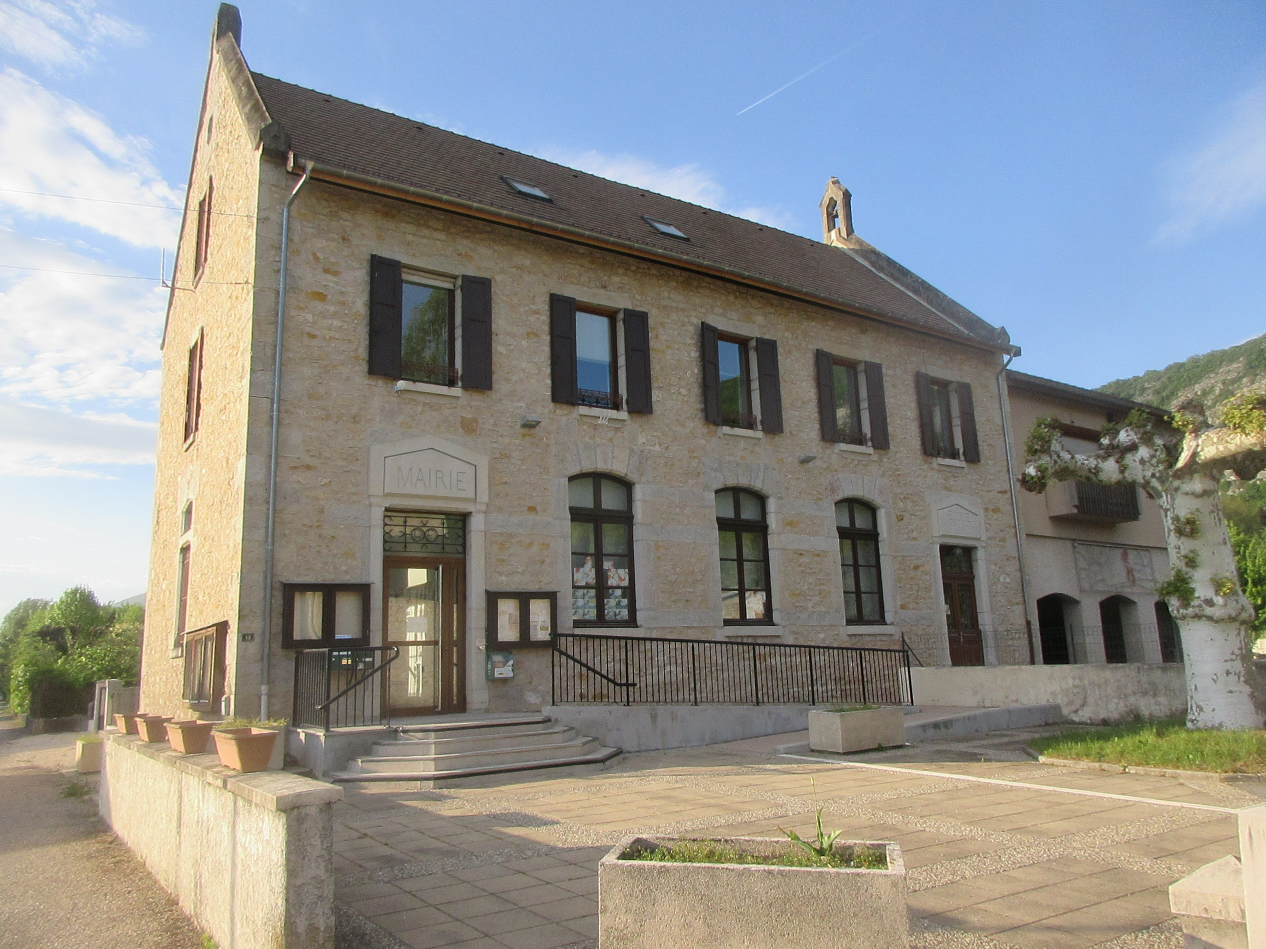 Mairie de Saint-Benoît, Groslée-Saint-Benoit.